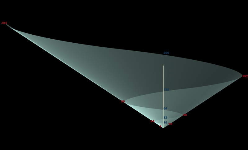 Il Metro Armonico